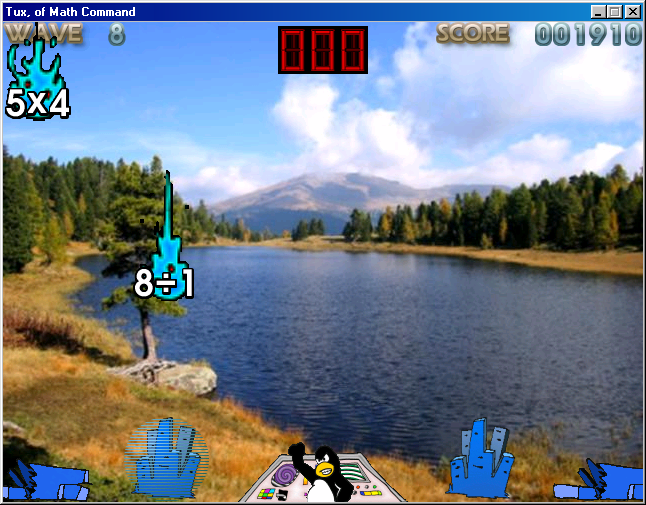 TuxMath mit dem Bild Image:Schwarzsee.jpg als Hintergrund.